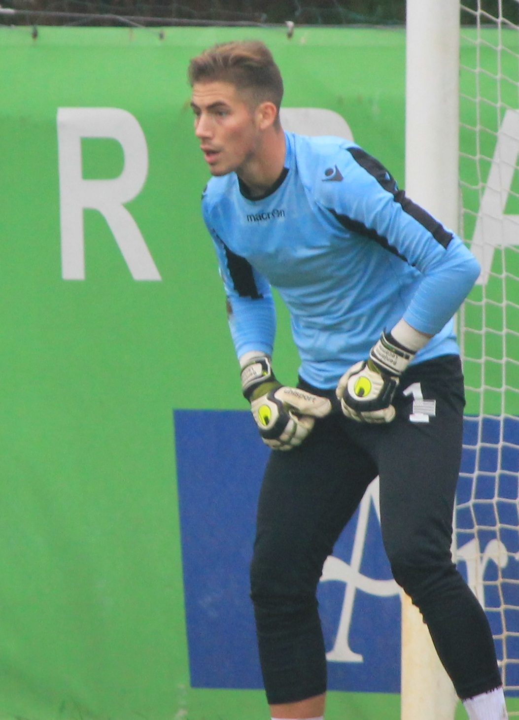 Benjamin Lecomte pendant un entrainement du FC Lorient le 3 janvier 2012